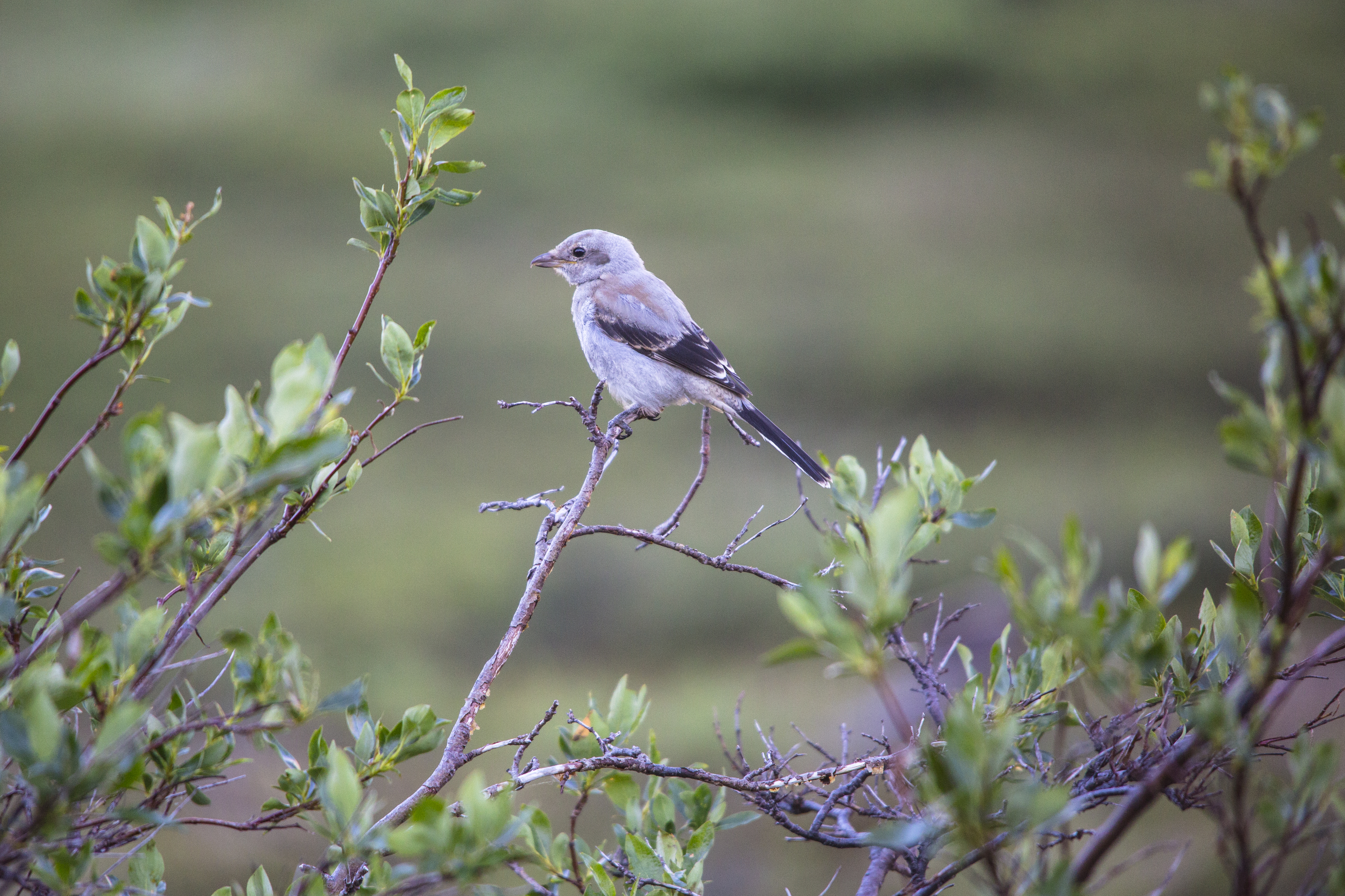 NPS / Jacob W. Frank